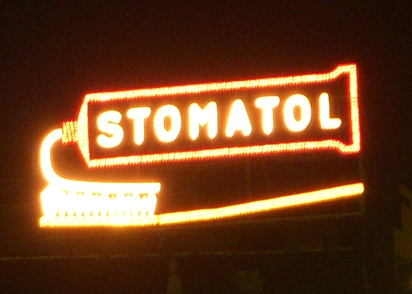 Stomatolskylten vid Slussen i Stockholm fyller 100 år (delbild 4)